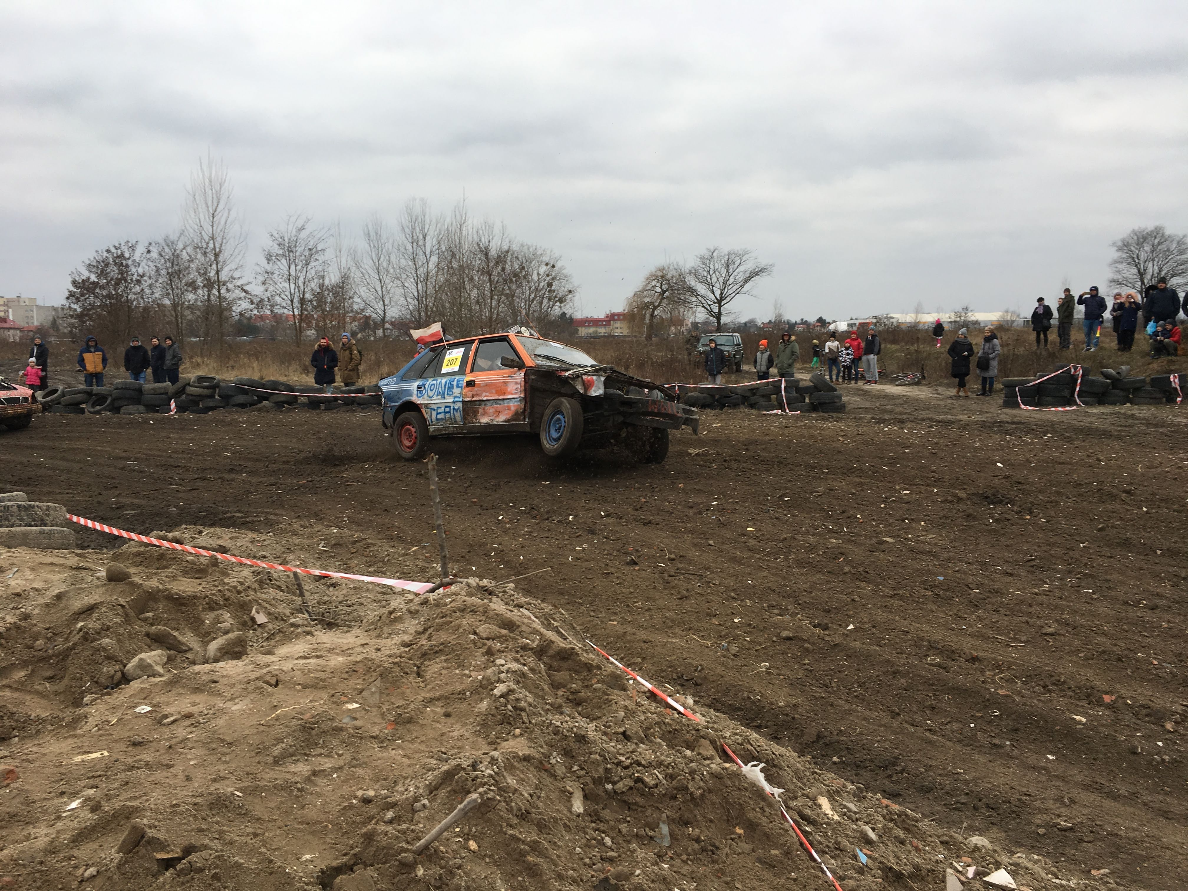 FSO Polonez Atu w malowaniu Blok Ekipy na Wrak Race